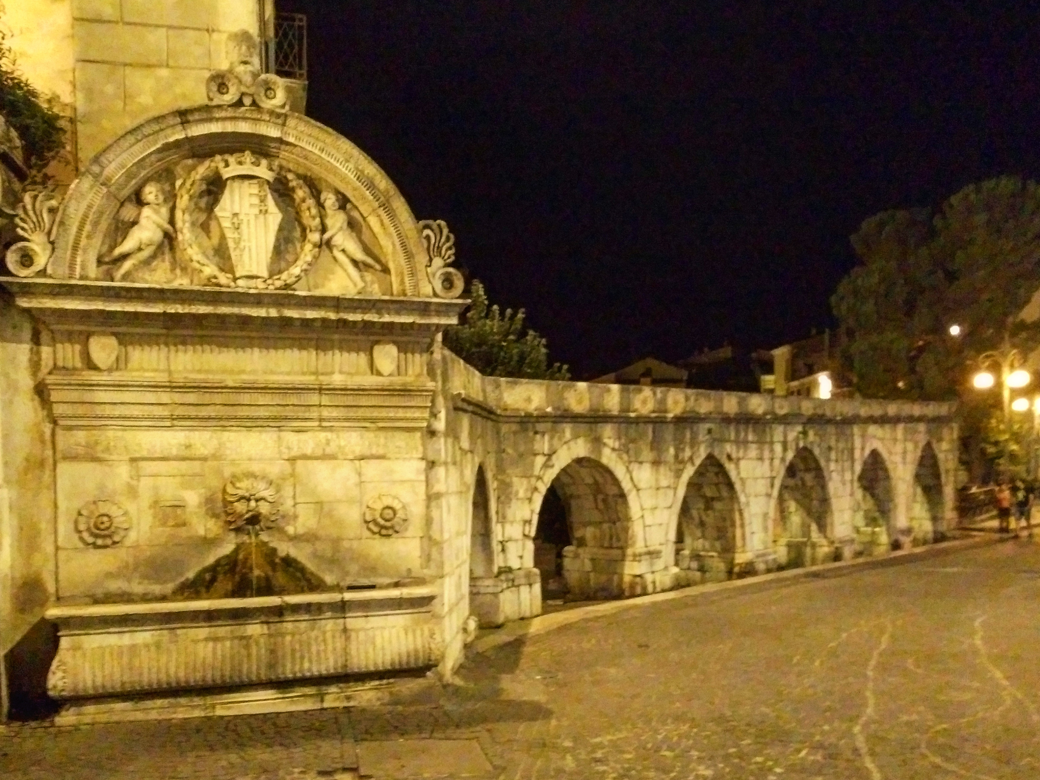 Sulmona